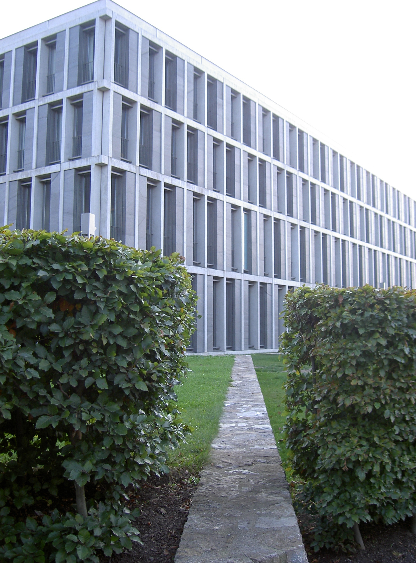 "Bundesarbeitsgericht" (errichtet zwischen 1996 und 1999), am Hugo-Preuß-Platz in Erfurt